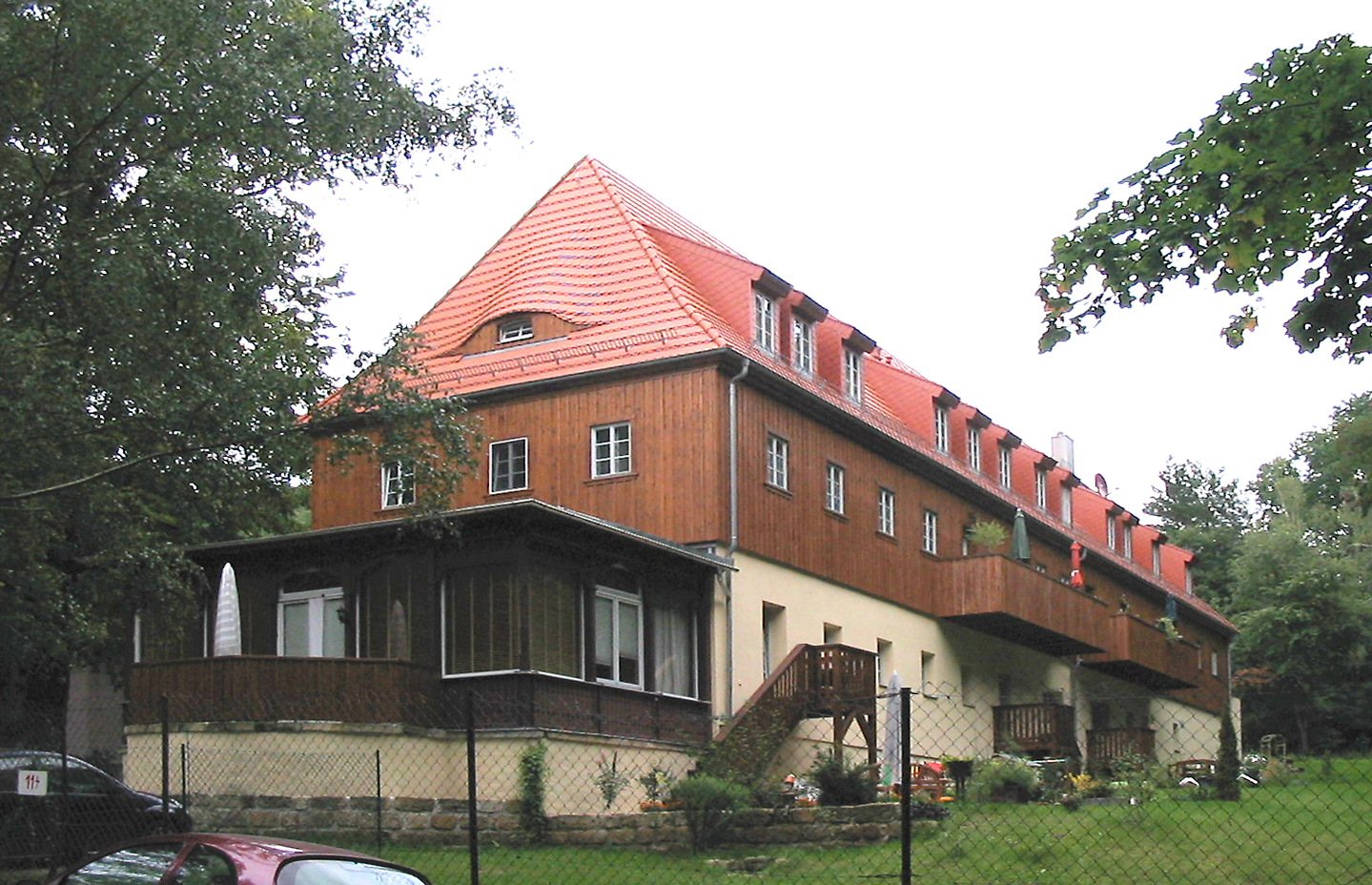 Fiedlerhaus in Radebeul, Südseite